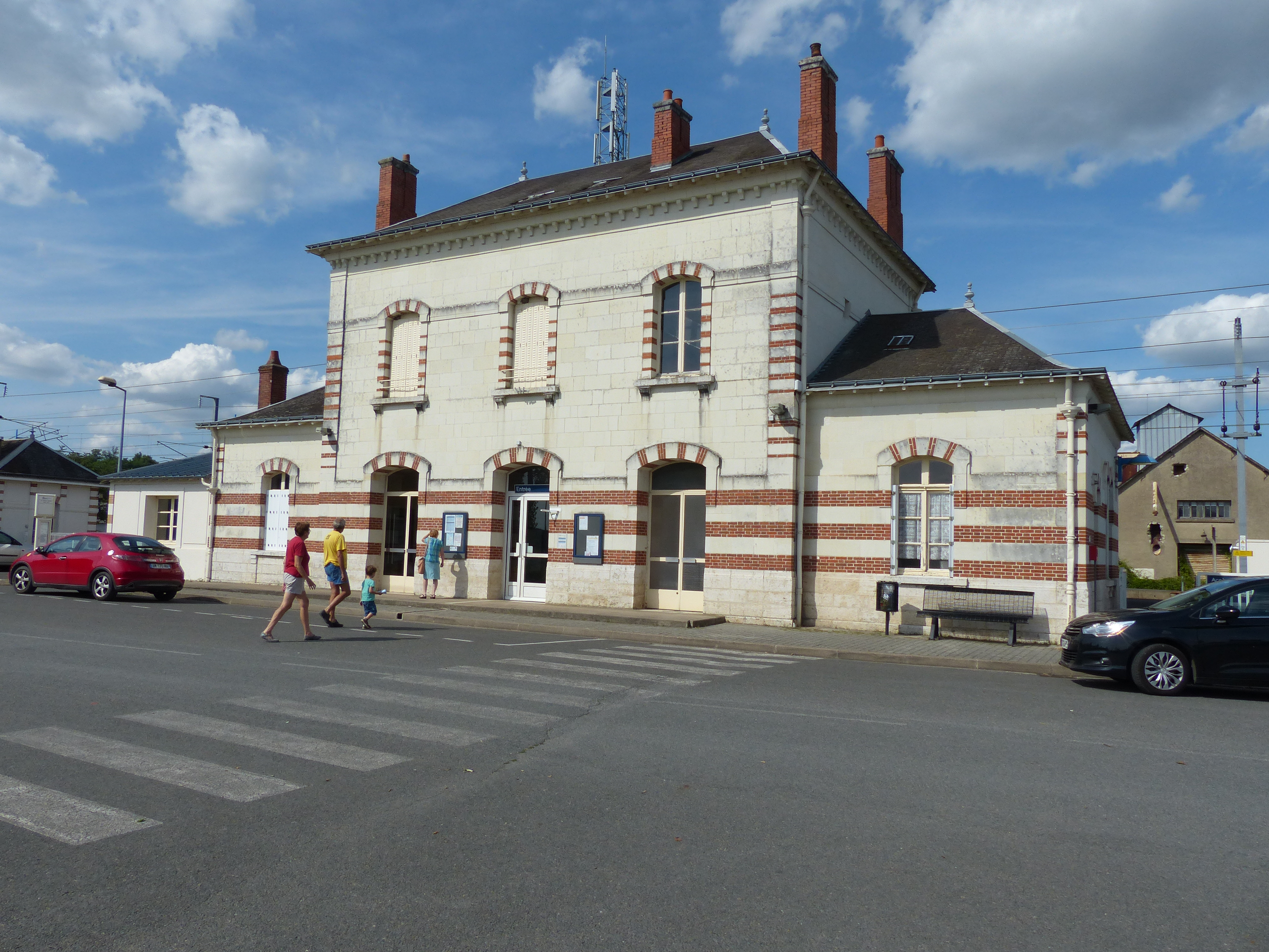 gare SNCF de Saint Aignan-Noyers sur Cher